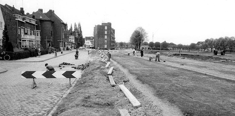 Aanleg van de Wittevrouwenweg nabij het Koningsplein in Maastricht in 1959. De weg werd later de N2, een verbindingsstuk in snelweg A2. Tegenwoordig ligt hier de "Groene Loper", een fiets- en wandelroute op het tunneldak van de Koning Willem Alexandertunnel. Fotocollectie RHCL Maastricht, GAM 7858.